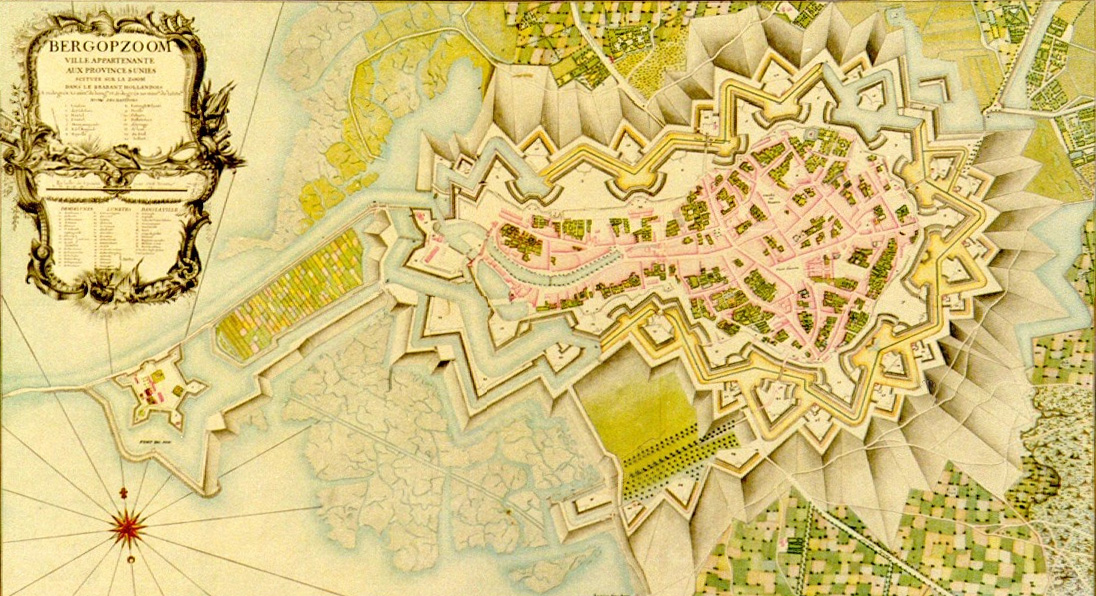 Kaart van Bergen op Zoom in 1747